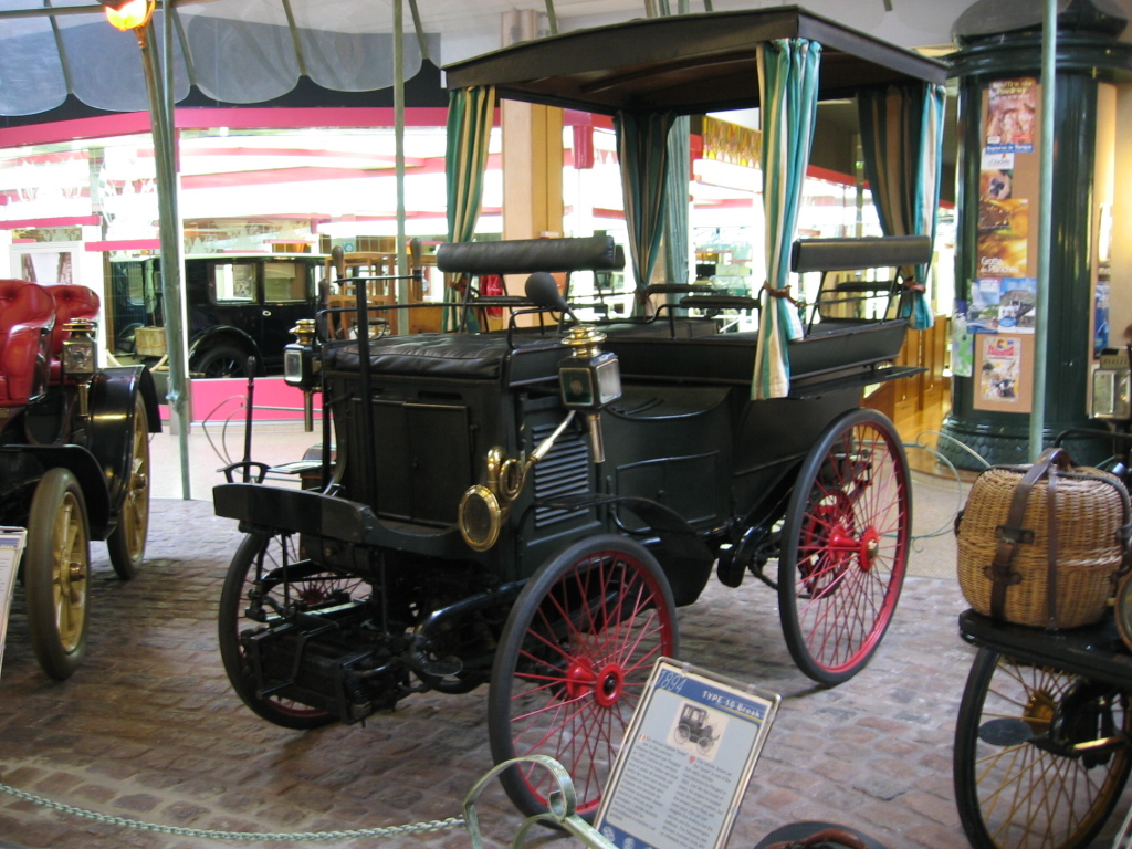 Peugeot Type 10 - Musée Peugeot Sochaux